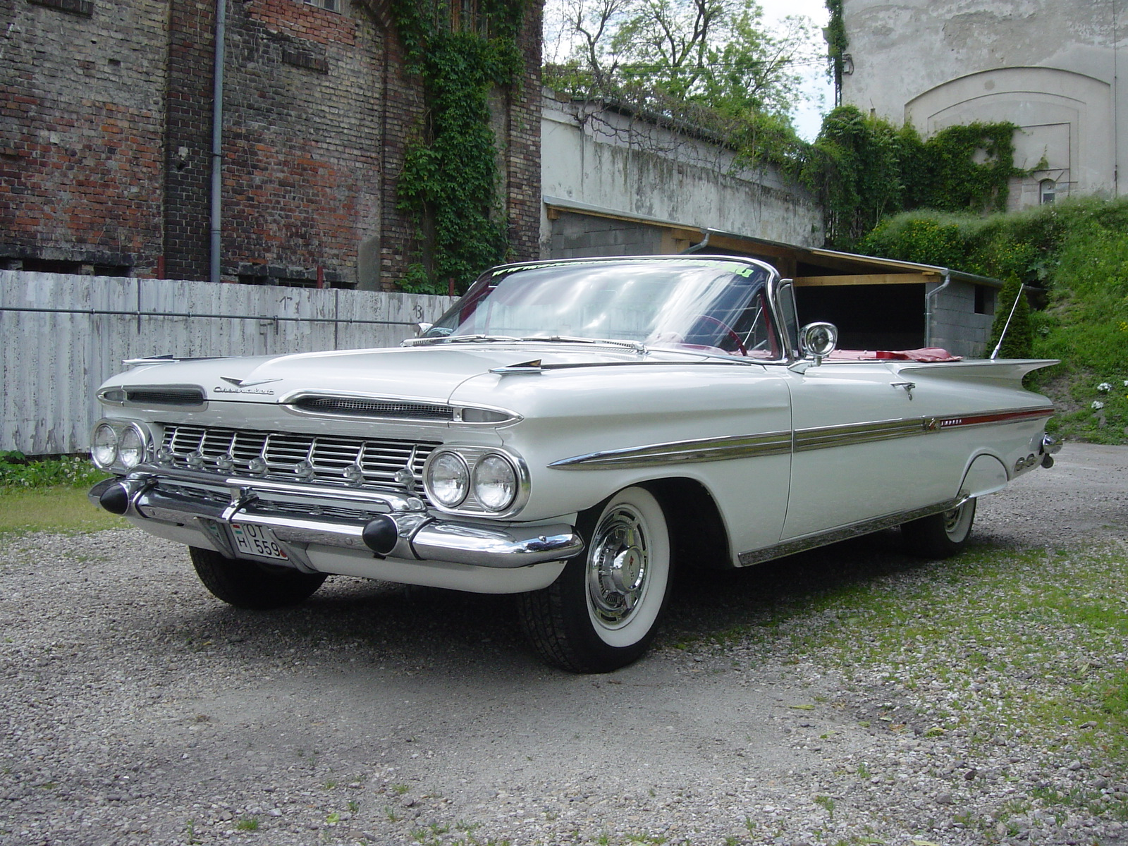 Álomautó múzeum